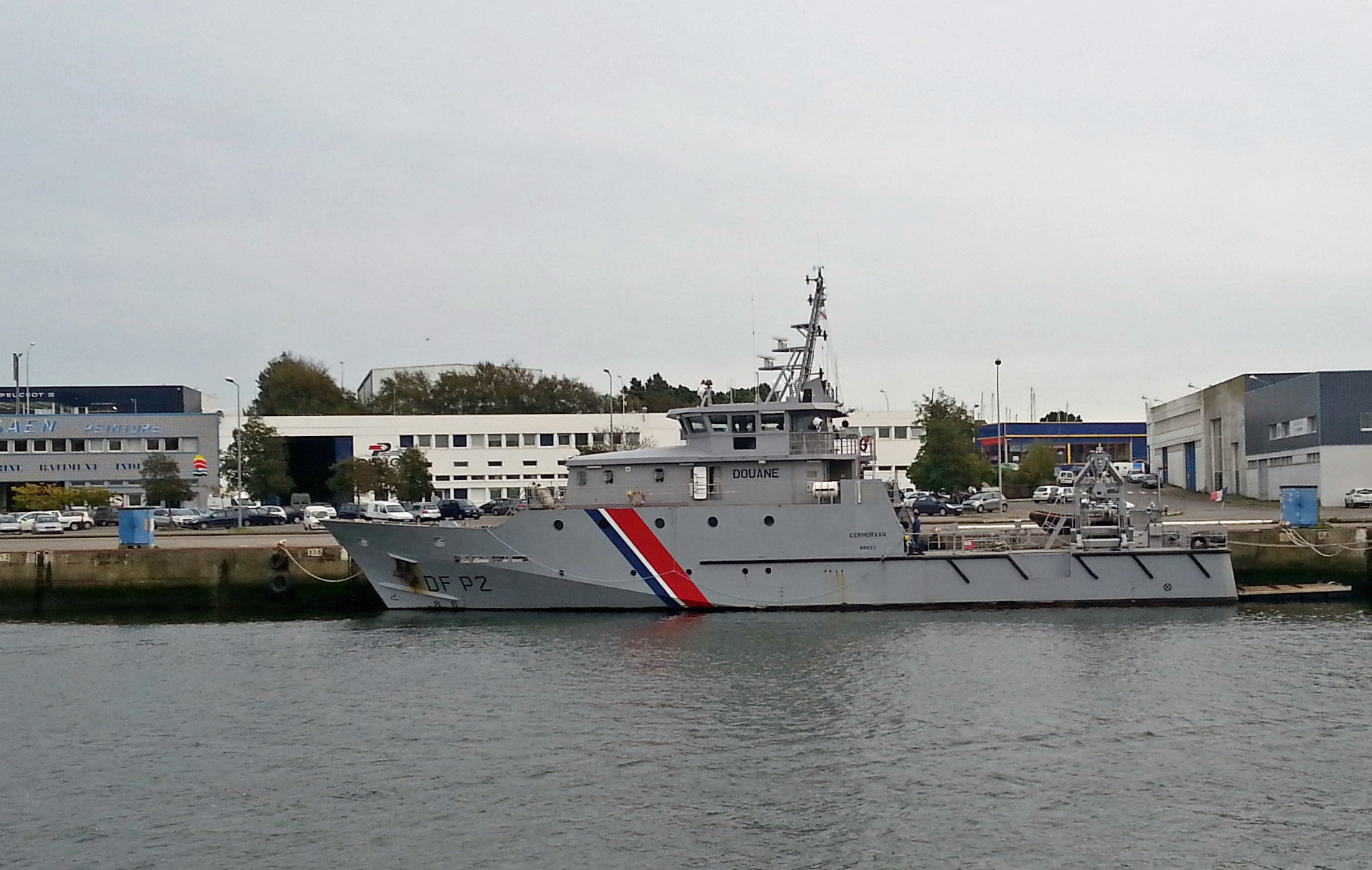 Le patrouilleur garde-cotes des douanes française Kermorvan (DF P2)